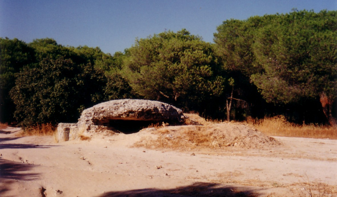 Foto tomada por Santiago Agueda Alonso Bunker de la Guerra Civil Española en La Dehesa de Navalcarbón de Las Rozas de Madrid Digitalizada con un scanner AGFA, a partir de una foto tomada con una camara reflex YASHICA